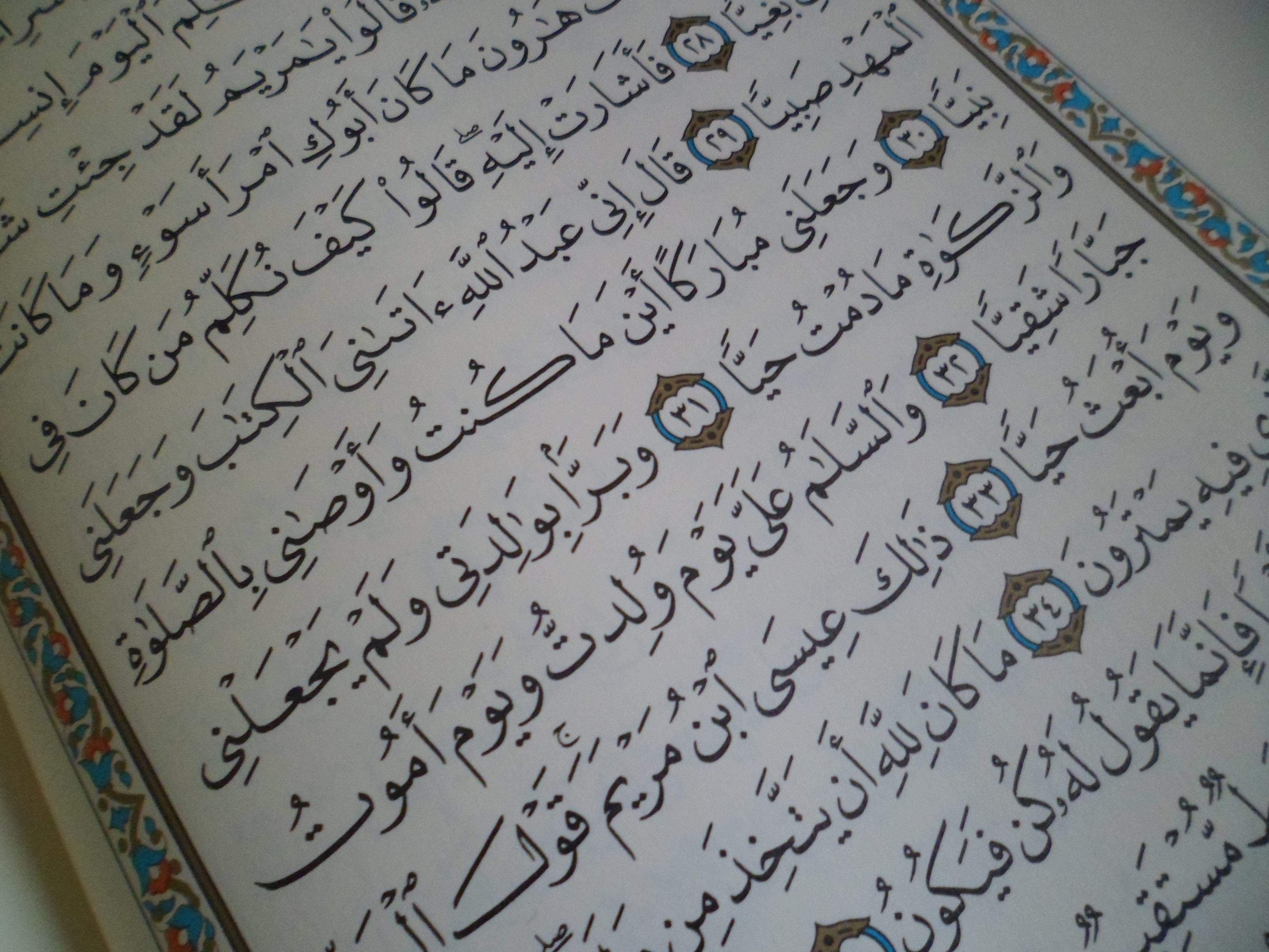 معجزة نطق عيسى المسيح في المهد في سورة مريم